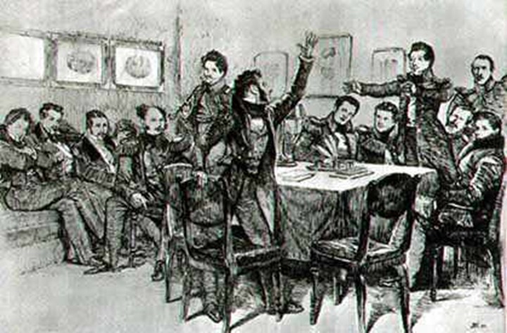 Пушкин среди декабристов в Каменке. Художник Д. Н. Кардовский. 1934 год